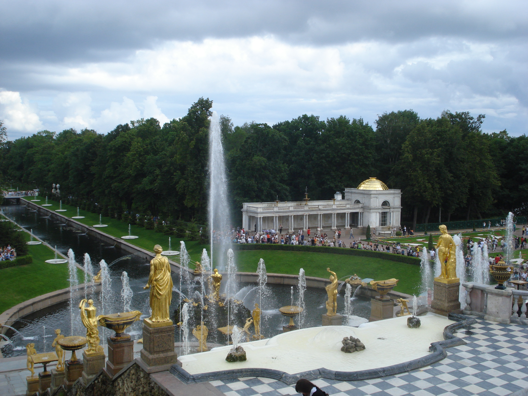 Петерхоф код С. Петербурга. 2. август 2009. Снимио: Јакша П.